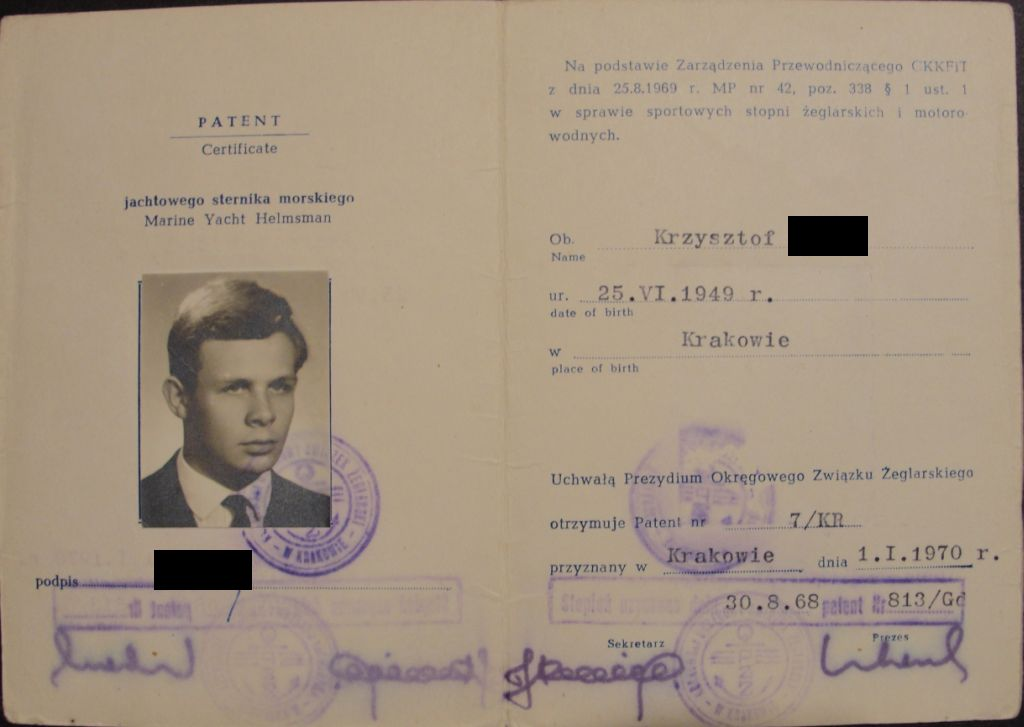 Patent j.st.m. obowiązujący od 01.01.1970